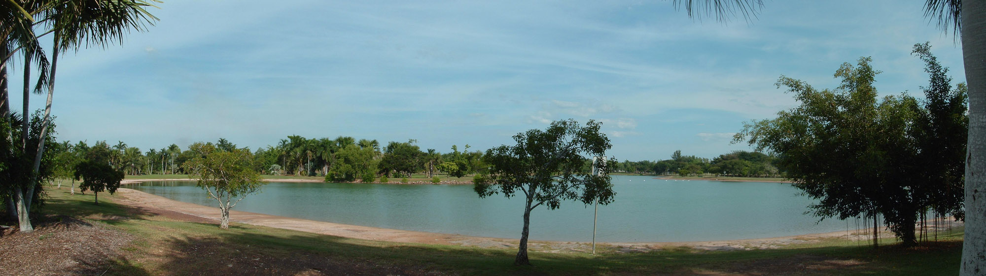 Lake Alexander, Darwin, NT, Australia.